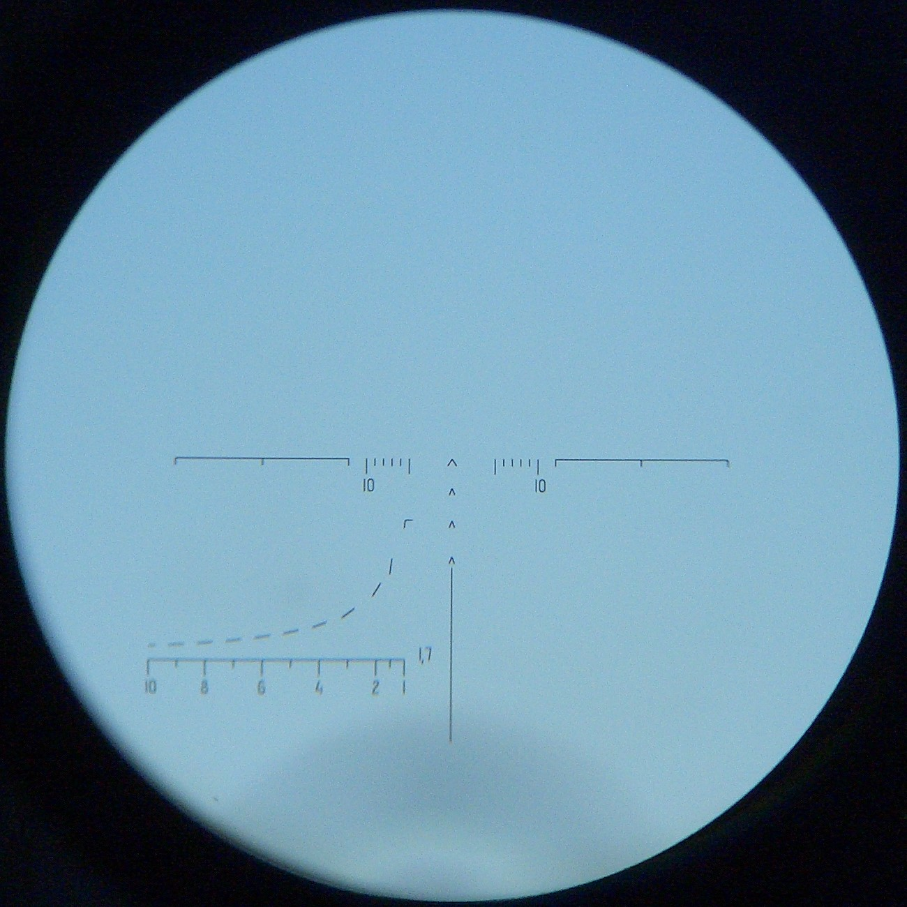 Piad_Setka.jpgПрицельная сетка оптического прицела ВОМЗ Pilad P4x32L